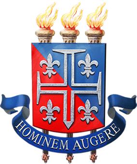 Brasão da Universidade do Estado da Bahia.